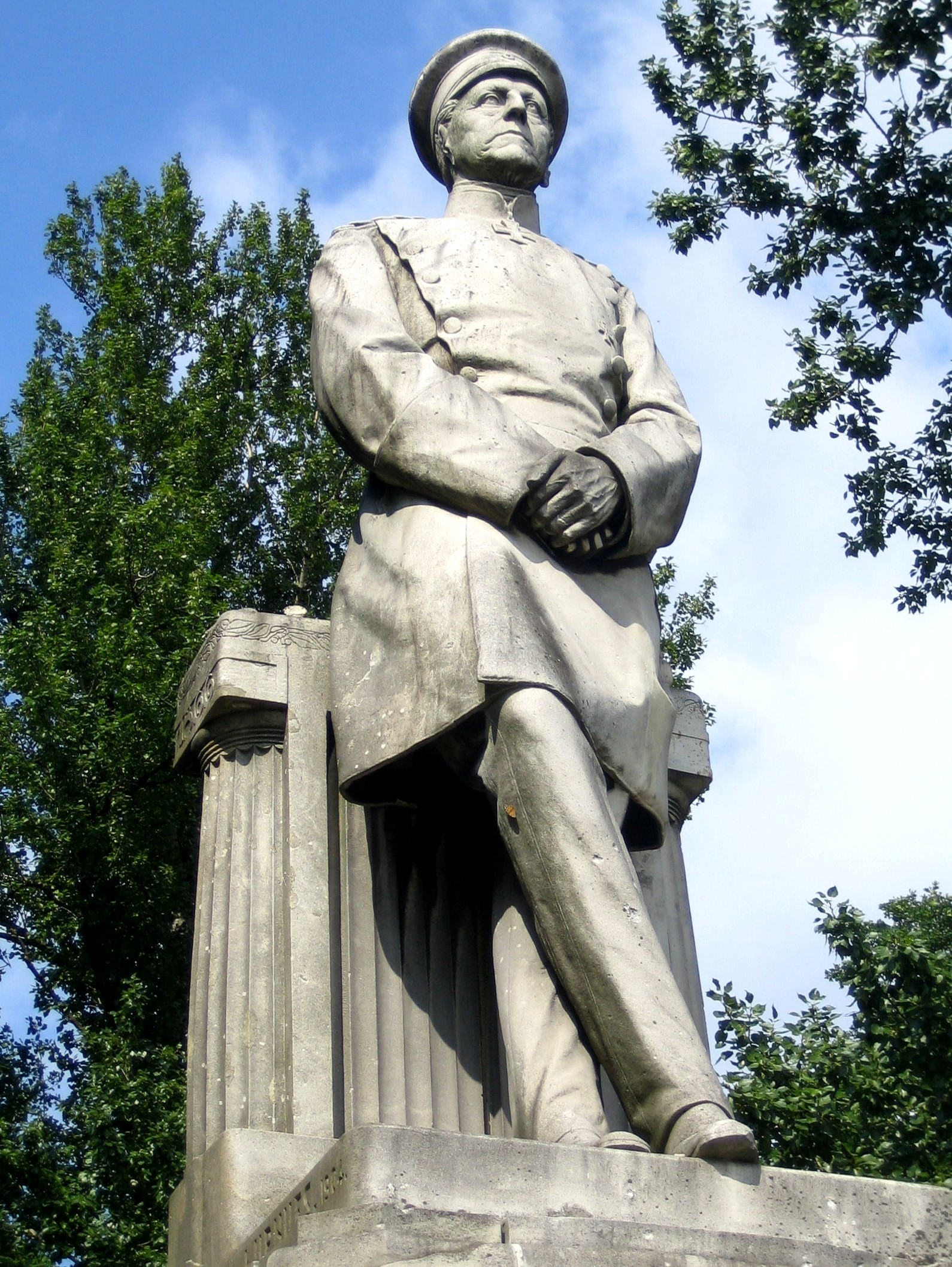 Denkmal des preußischen Generalfeldmarschalls Helmuth Karl Bernhard von Moltke am Großen Stern im Großen Tiergarten in Berlin-Mitte. Bildhauer: Joseph Uphues. Enthüllt am 25. Oktober 1905.